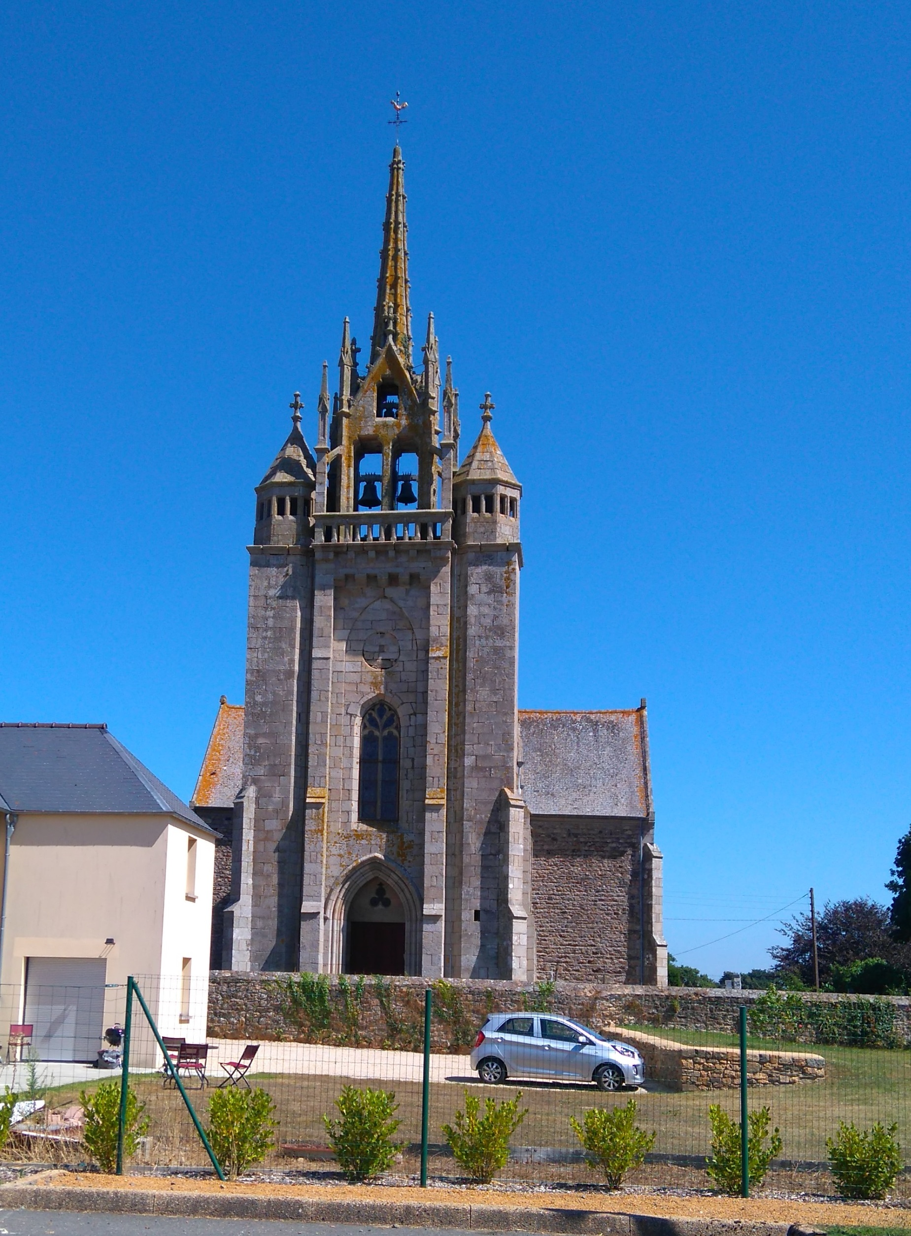 Eglise de Trévérec